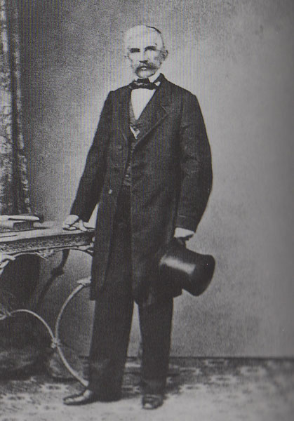 Стефан Марковић, политичар (1804-1864)